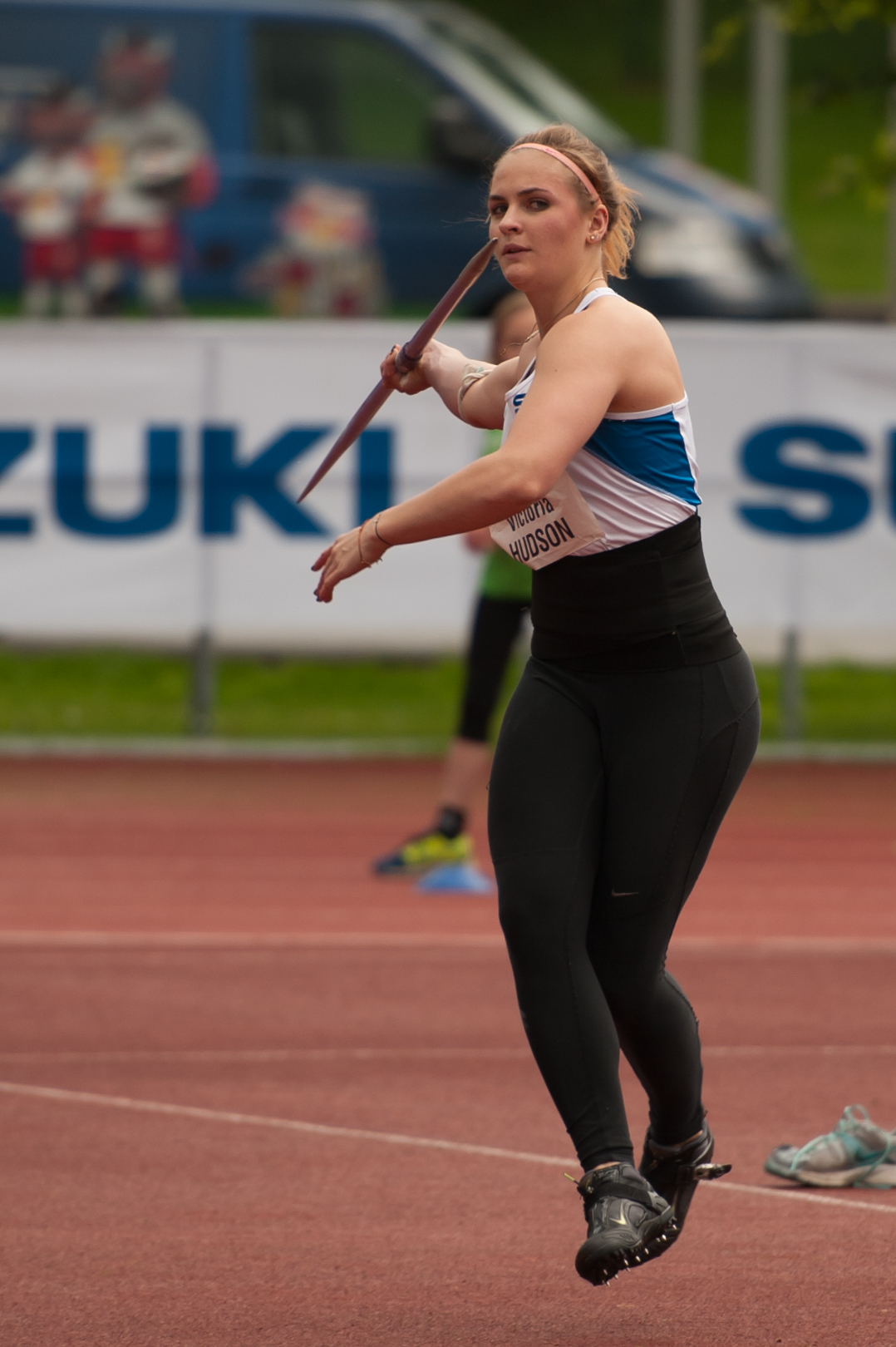 Salzburger Leichtathletik Gala am 27. Mai 2015: Victoria Hudson